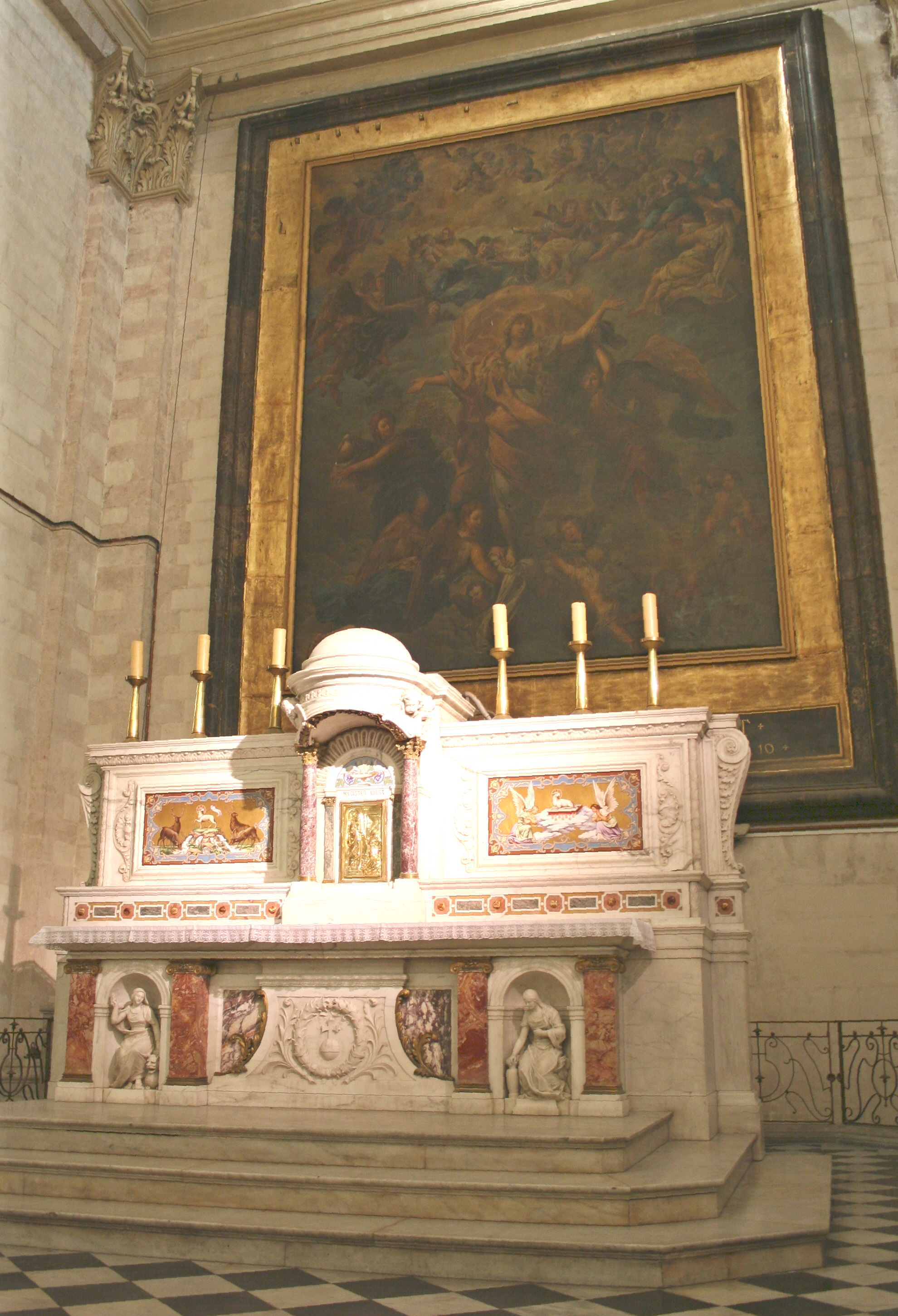 Eglise des chartreux à Marseille, maître autel de Dupoux (1893) et tableau de Michel Serre représentant l'apothéose de Sainte Marie Madeleine (XVIIIe siècle).